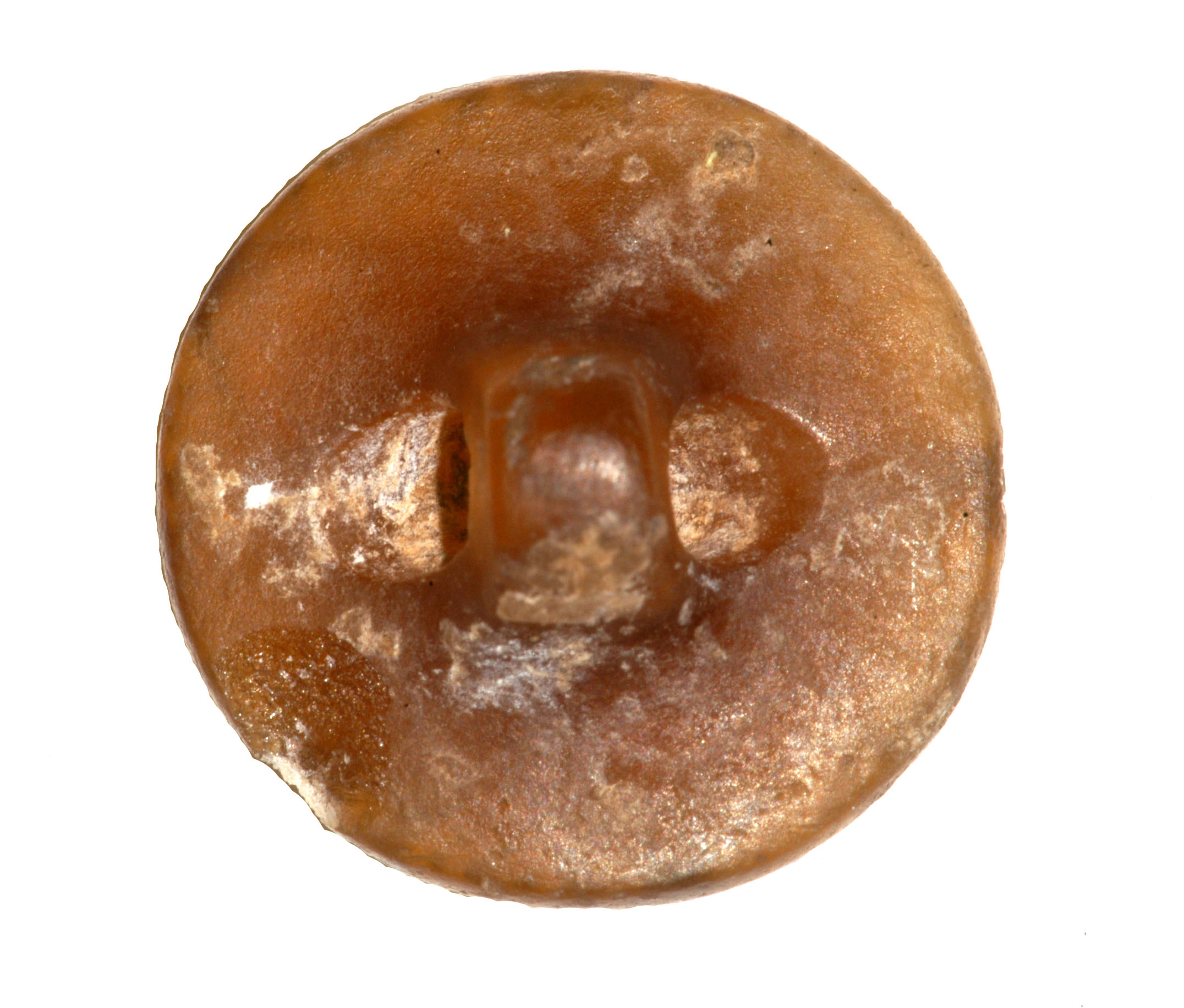 חותם משכבה - אתר ארכאולוגי הגושרים IV